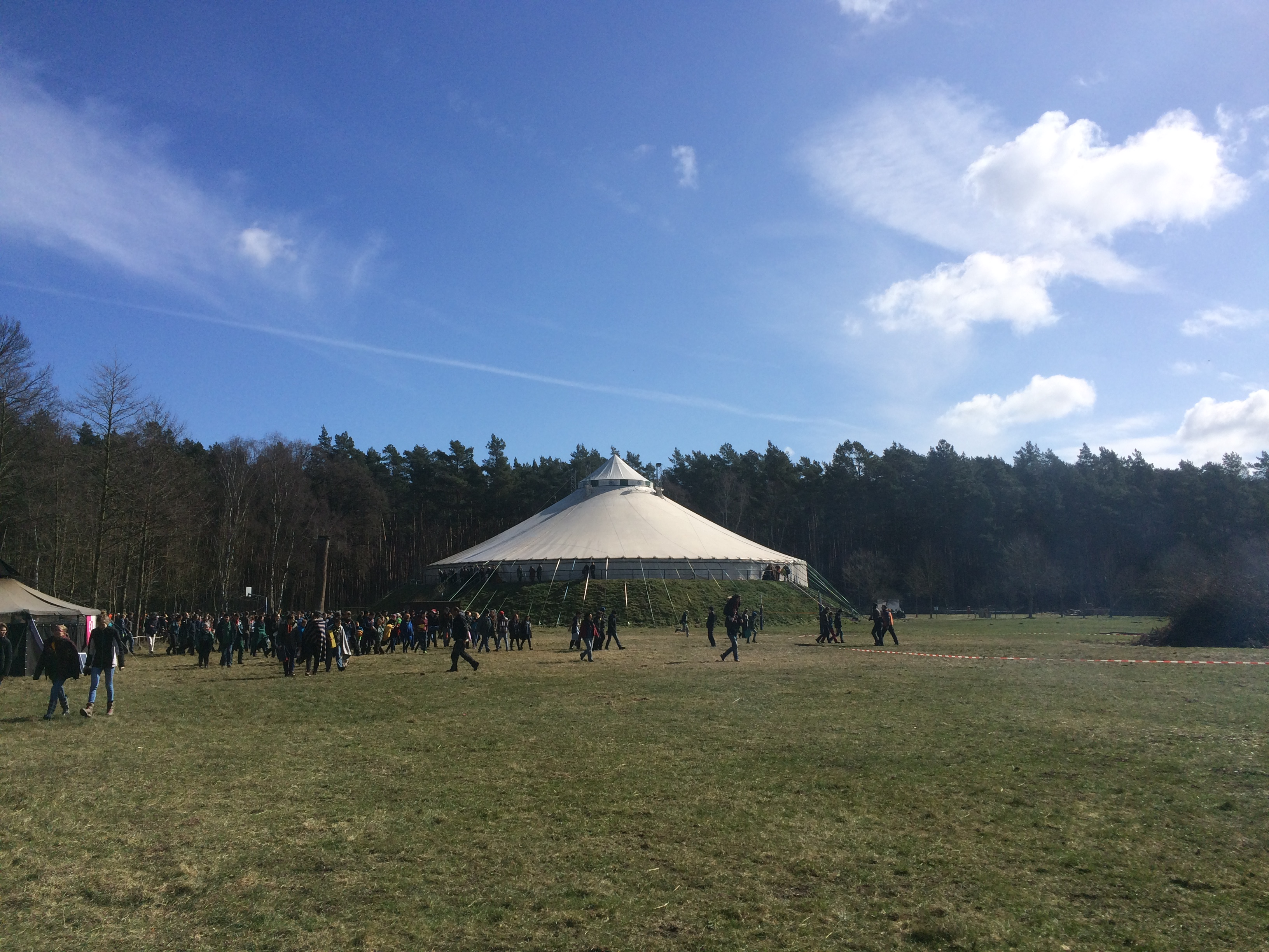 Zirkuszelt auf dem Pfadfinder-Zeltplatz Friedensau